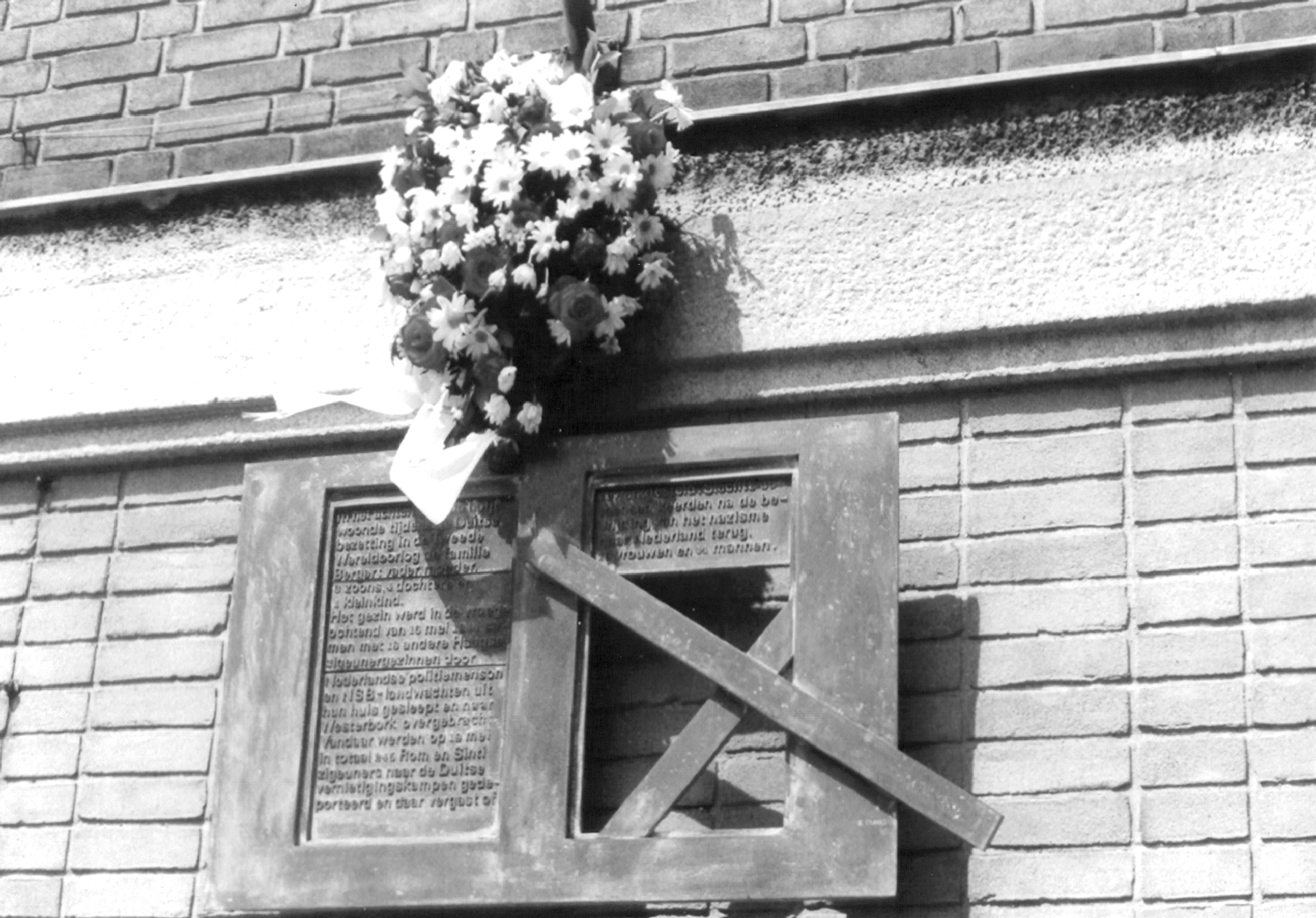 Herinneringsplaquette tegen muur van voormalige hoofdbibliotheek aan de Bilderdijkstraat